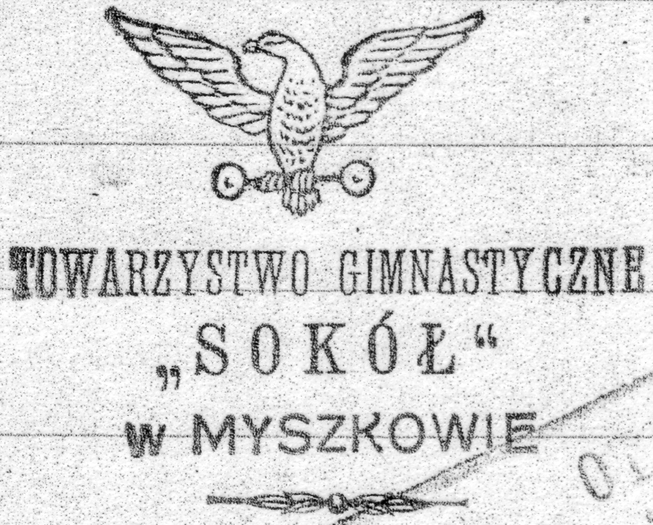 Fotografia fragmentu dokumentu z pieczęcią Towarzystwa Gimnastycznego Sokół w Myszkowie z okresu II Rzeczypospolitej